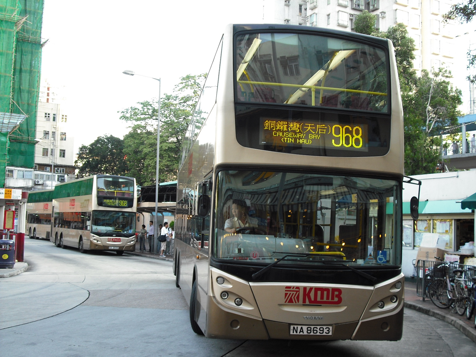 九巴968線的新車（富豪B9TL），攝於元朗西巴士總站